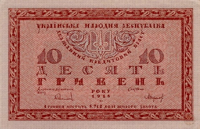 10 гривен Украинской Народной Республики 1918 года